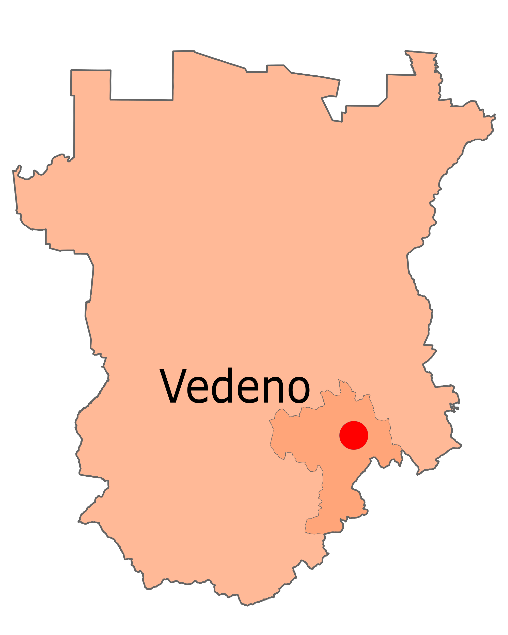 Locatie Vedeno